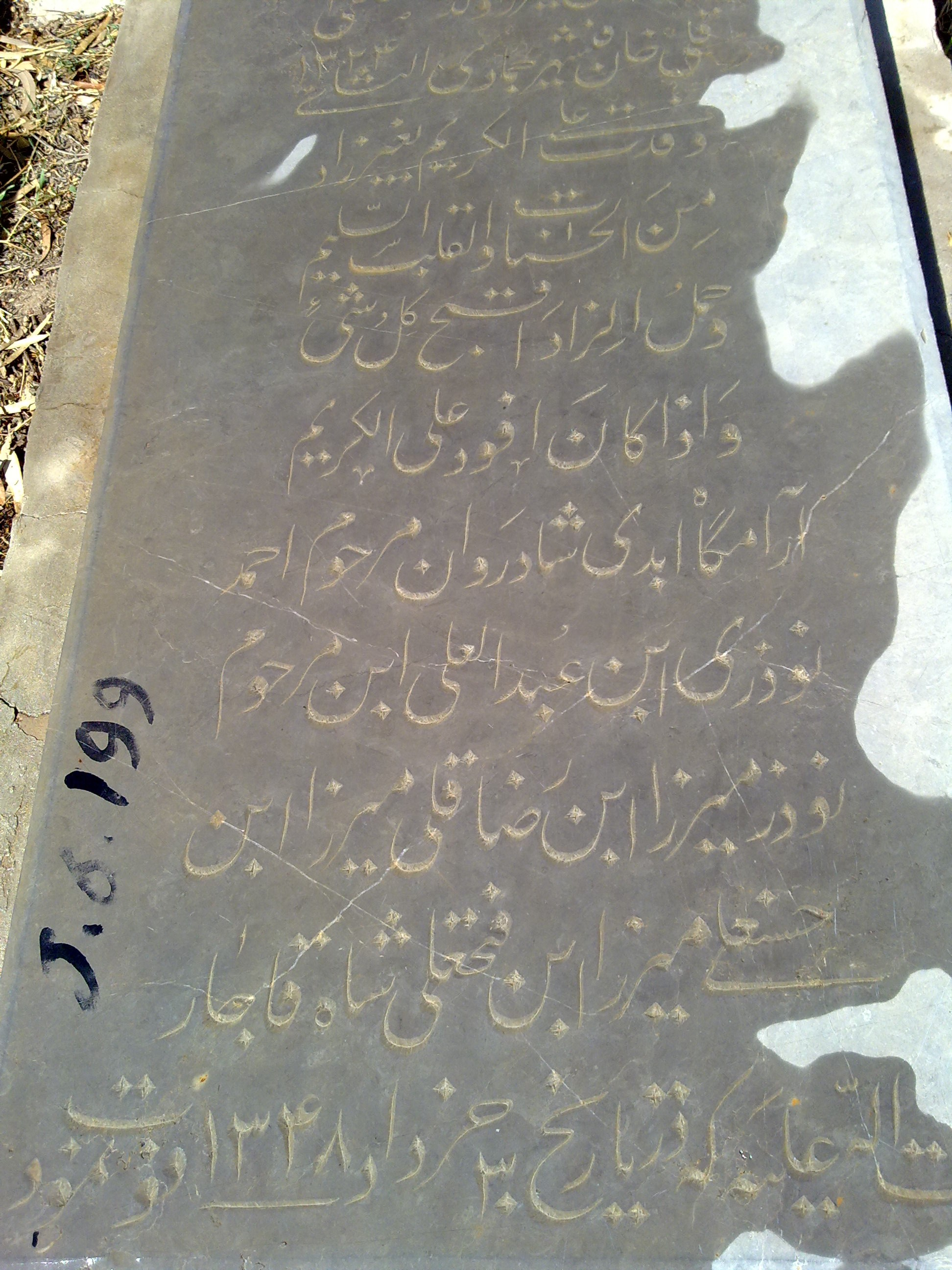 این قبر مربوط به احمد میرزا نوذری از نوادگان قاجار است. روی این سنگ آورده شده است که رضاقلی میرزا نیز یکی از پسران حسنعلی میرزا میباشد. این سنگ قبر در قبرستان قدیمی دباغی در شهر شیراز واقع است.